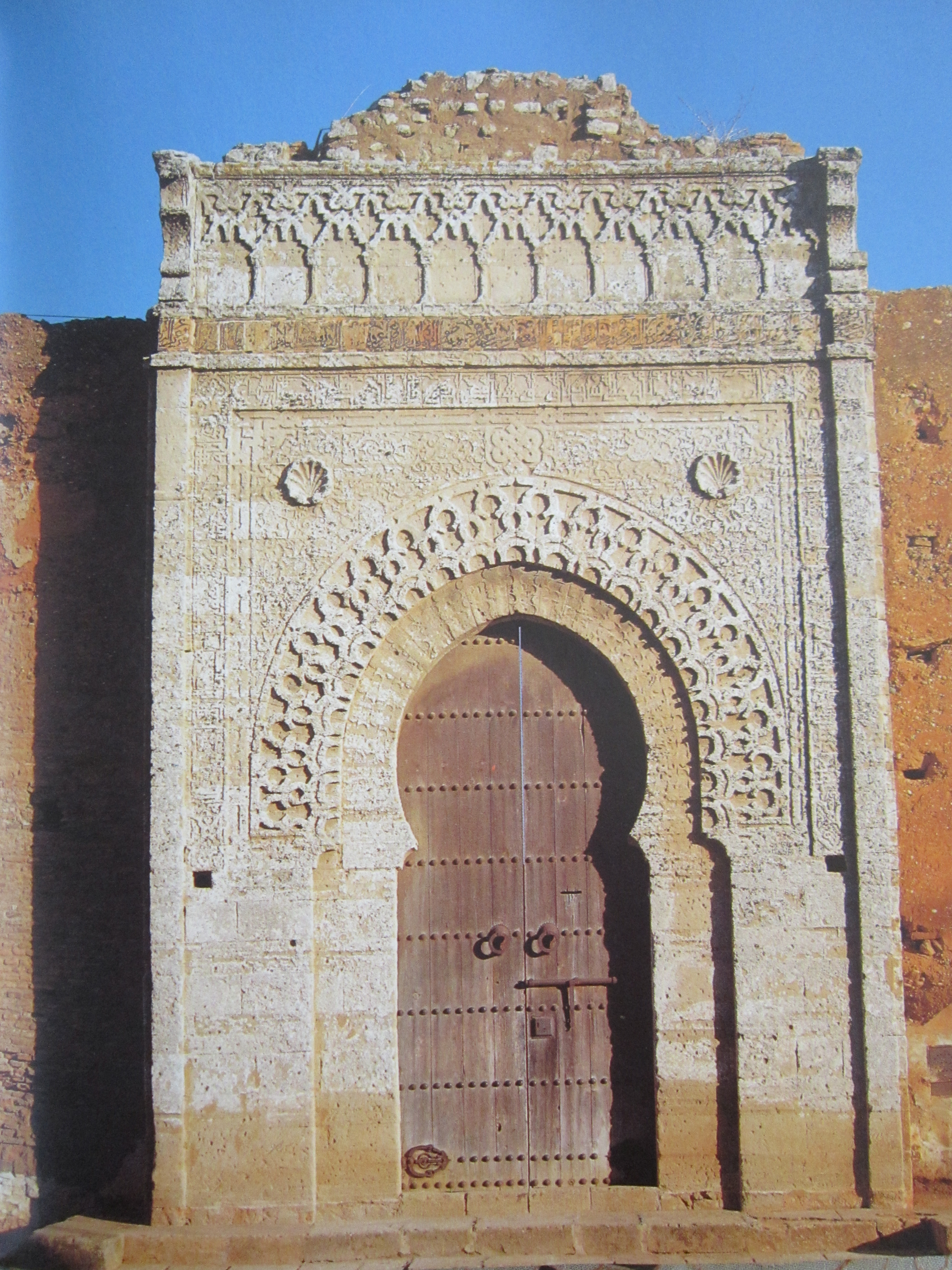 Zaouiyat Annoussak à Salé